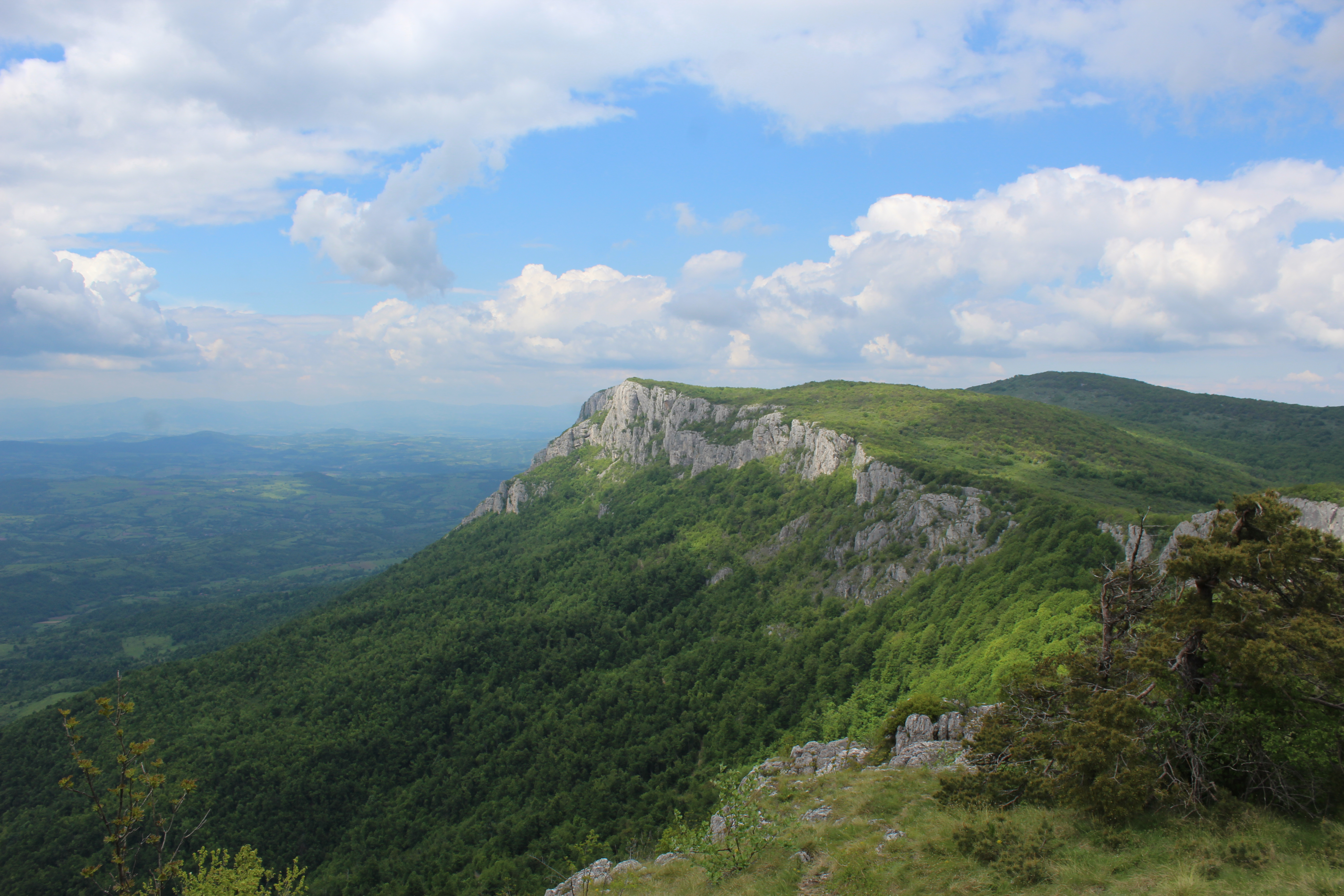 Srpski (latinica): Greben Tupižnice.